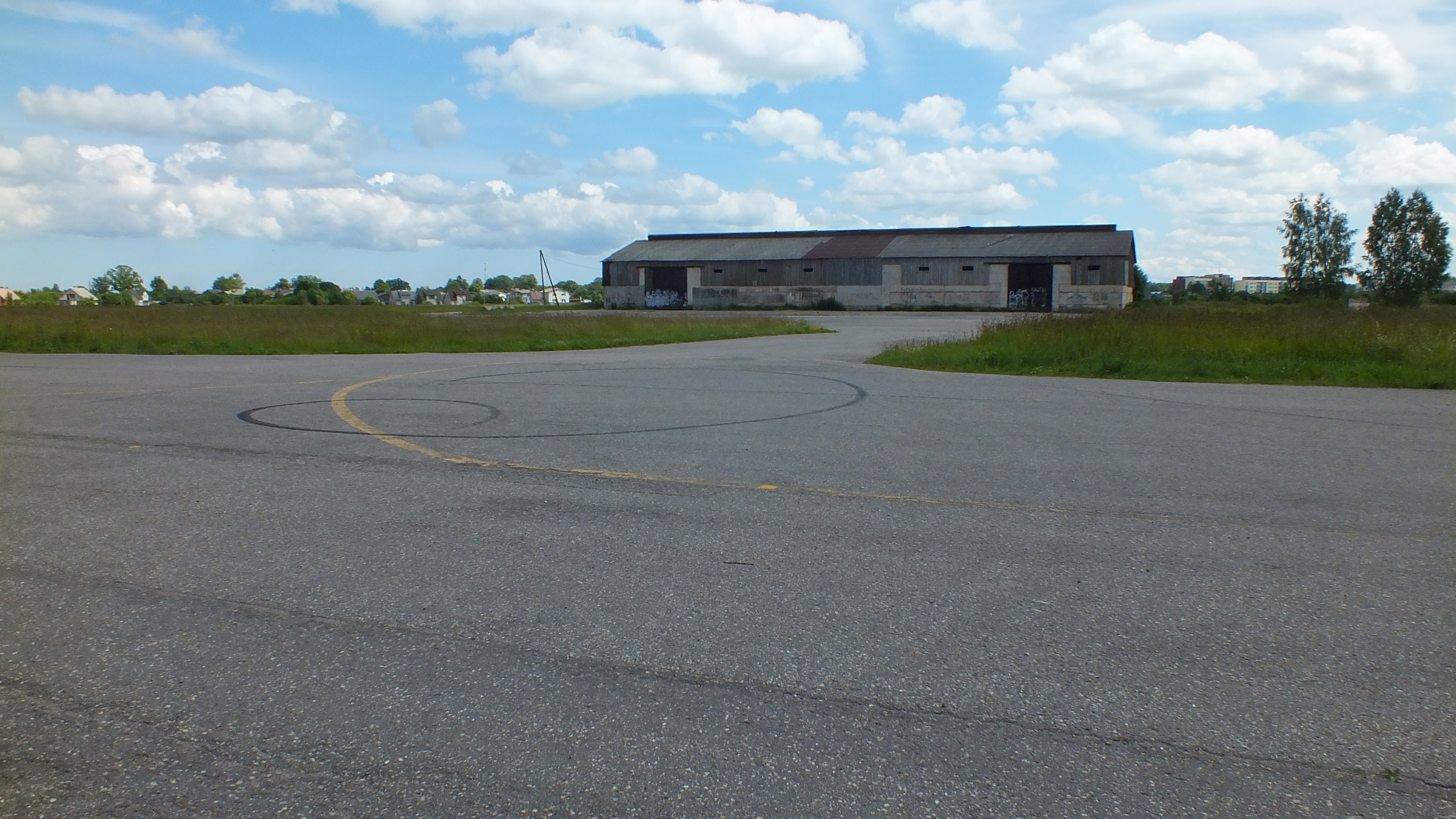 Talsu lidlauka noliktava